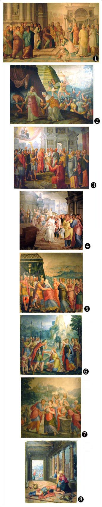 De deugdzame vrouwen, reeks schilderijen van Lambert Lombard uit de abdij van Herkenrode. Foto's gemaakt van de schilderijen door Author died in 1566, see: :en:Lambert Lombard